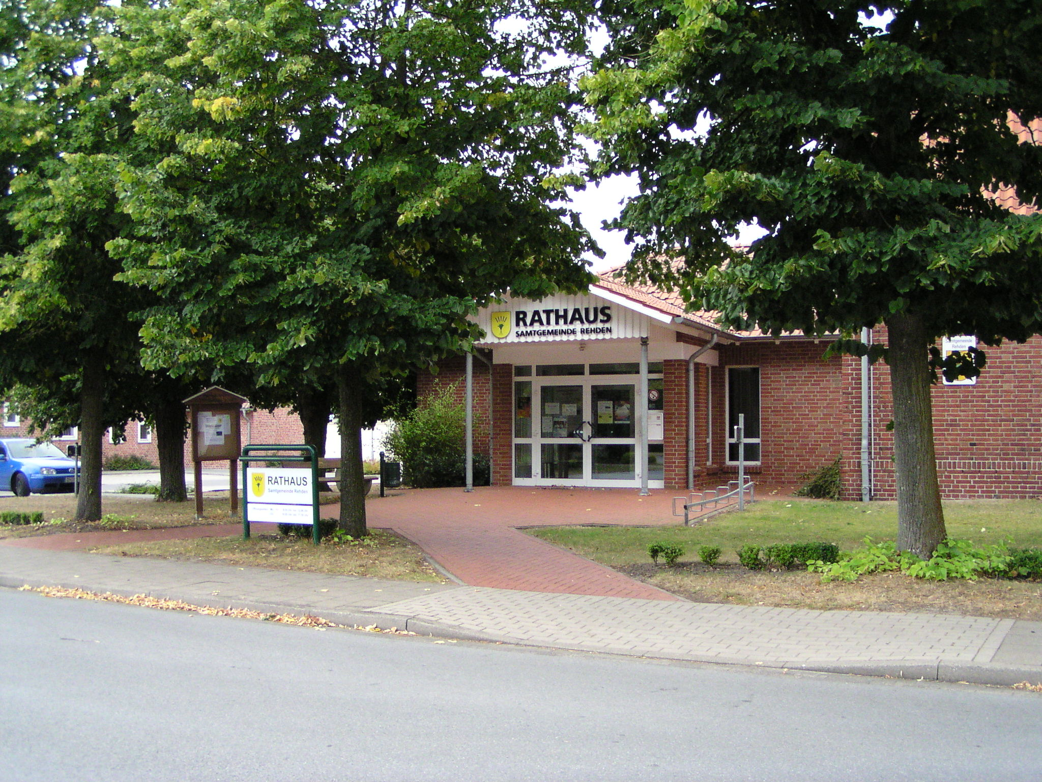 Rathaus der Samtgemeinde Rehden am 29.08.2009